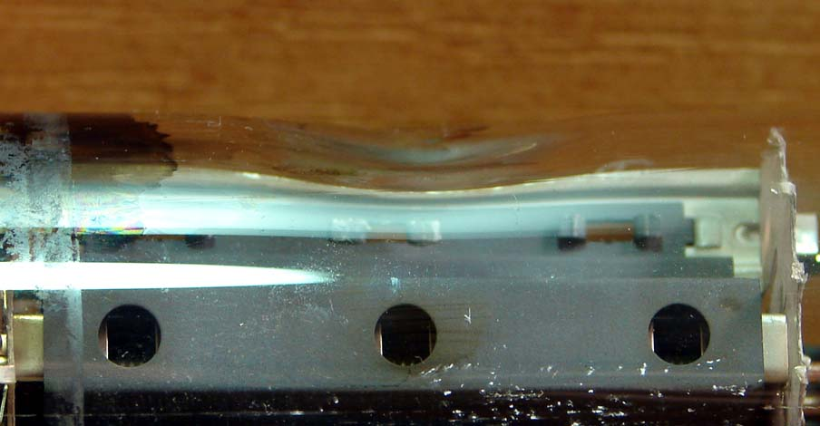 Angeschmolzener Glaskolben einer überhitzten Röhre PL509